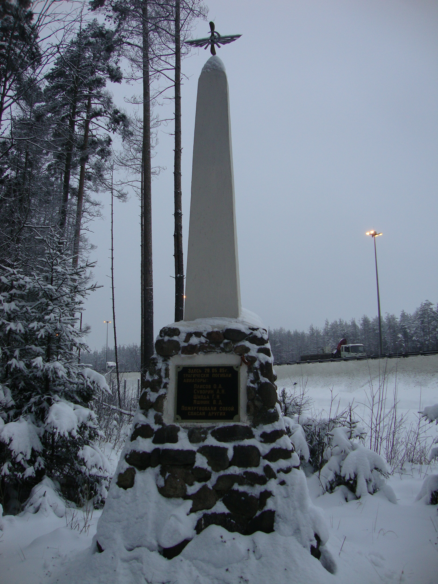 Обелиск авиаторам в Ржевском лесопарке. На заднем плане — КАД.